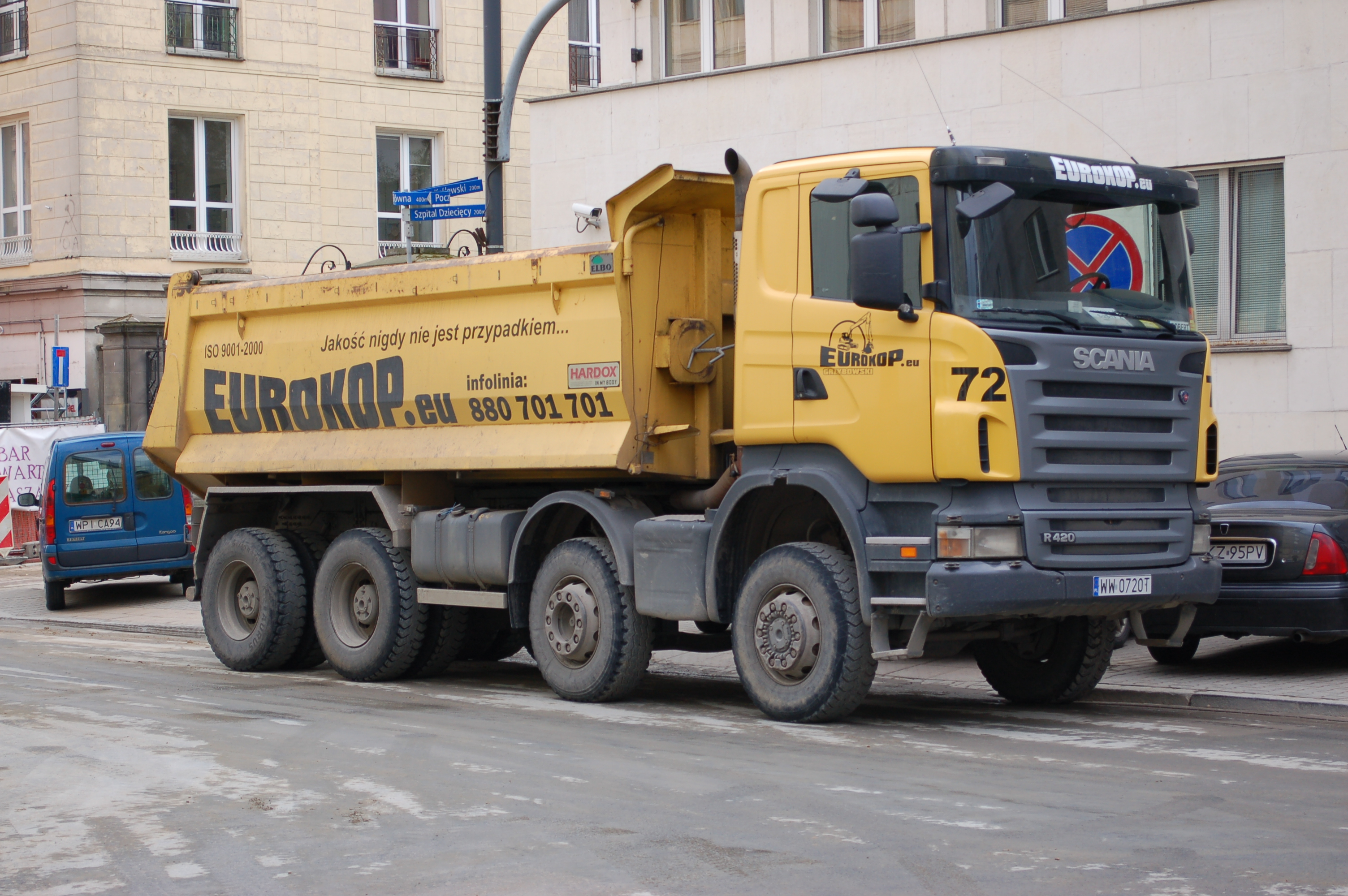 Metrobau Warschau